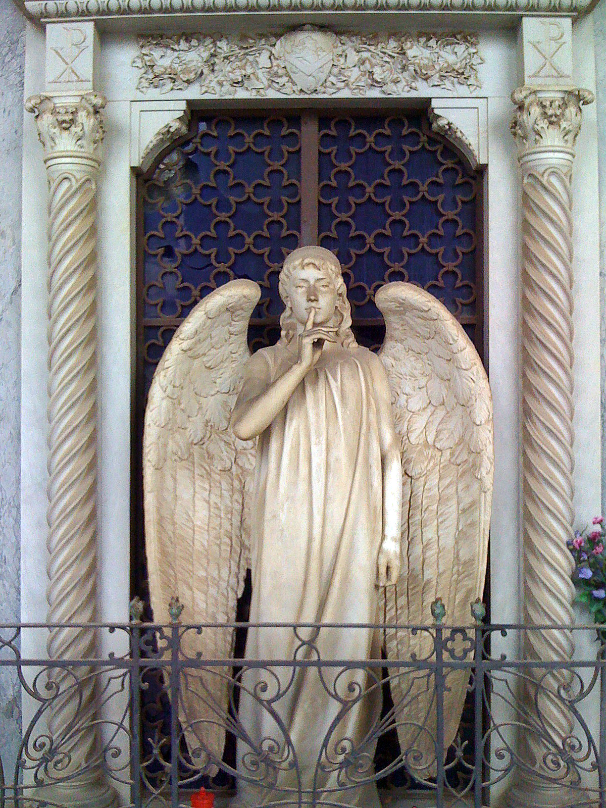 Monumento funebre conservato nel Cimitero Monumentale dell'Antella